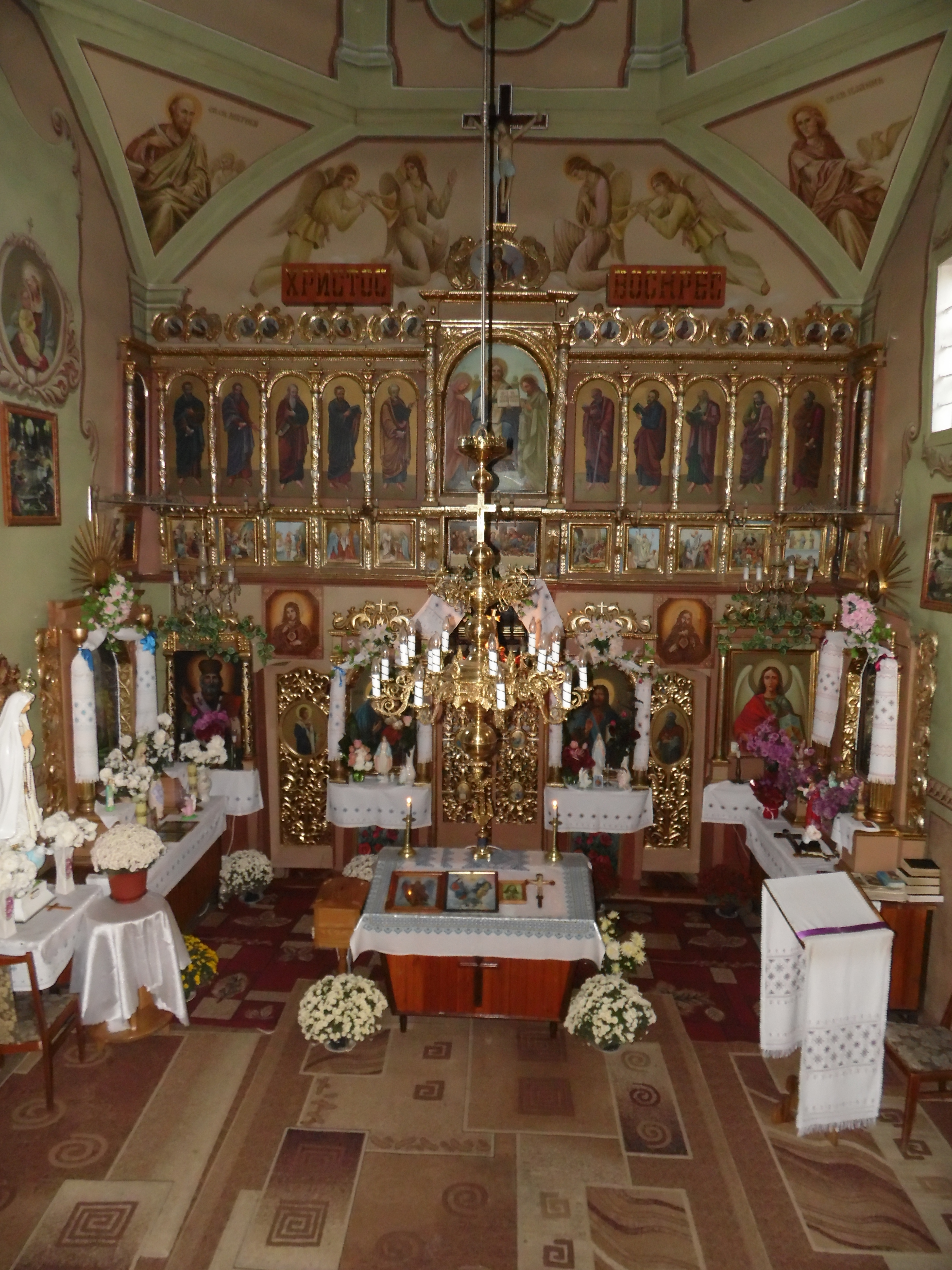 Інтер'єр Церкви св. архістратига Михаїла с. Мужиловичі